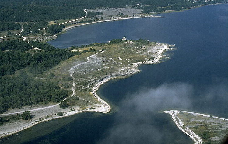 Från Lörgeholm. Naturreservatet Lörgeudd i bildens mitt. Motiv: Kyllaj Nyckelord: Flygbilder, Naturreservat, Riksintressen Kategori: Utv malm/mineralFrån Lörgeholm. Naturreservatet Lörgeudd i bildens mitt.